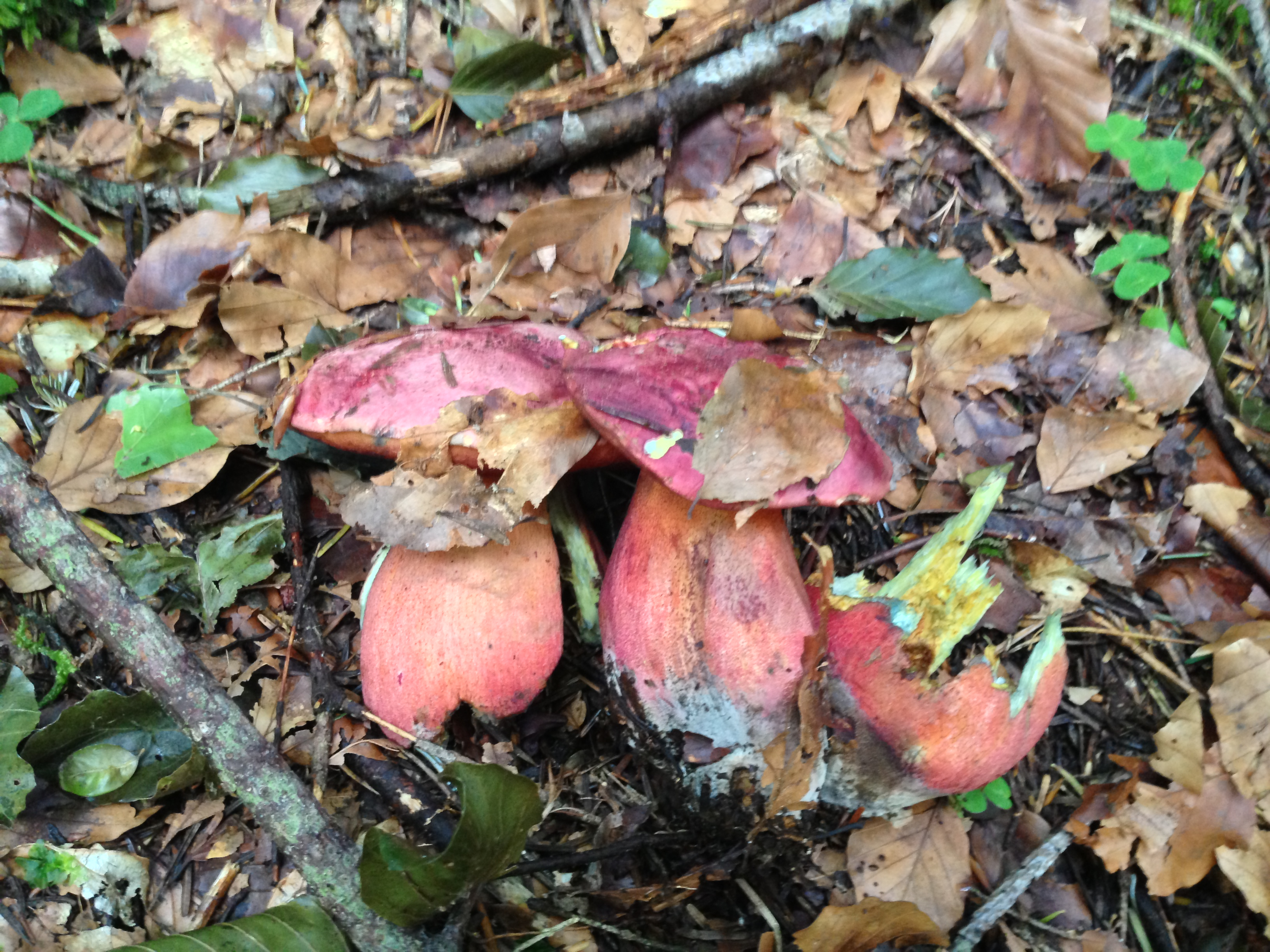 A Manolo le escucho el bosque